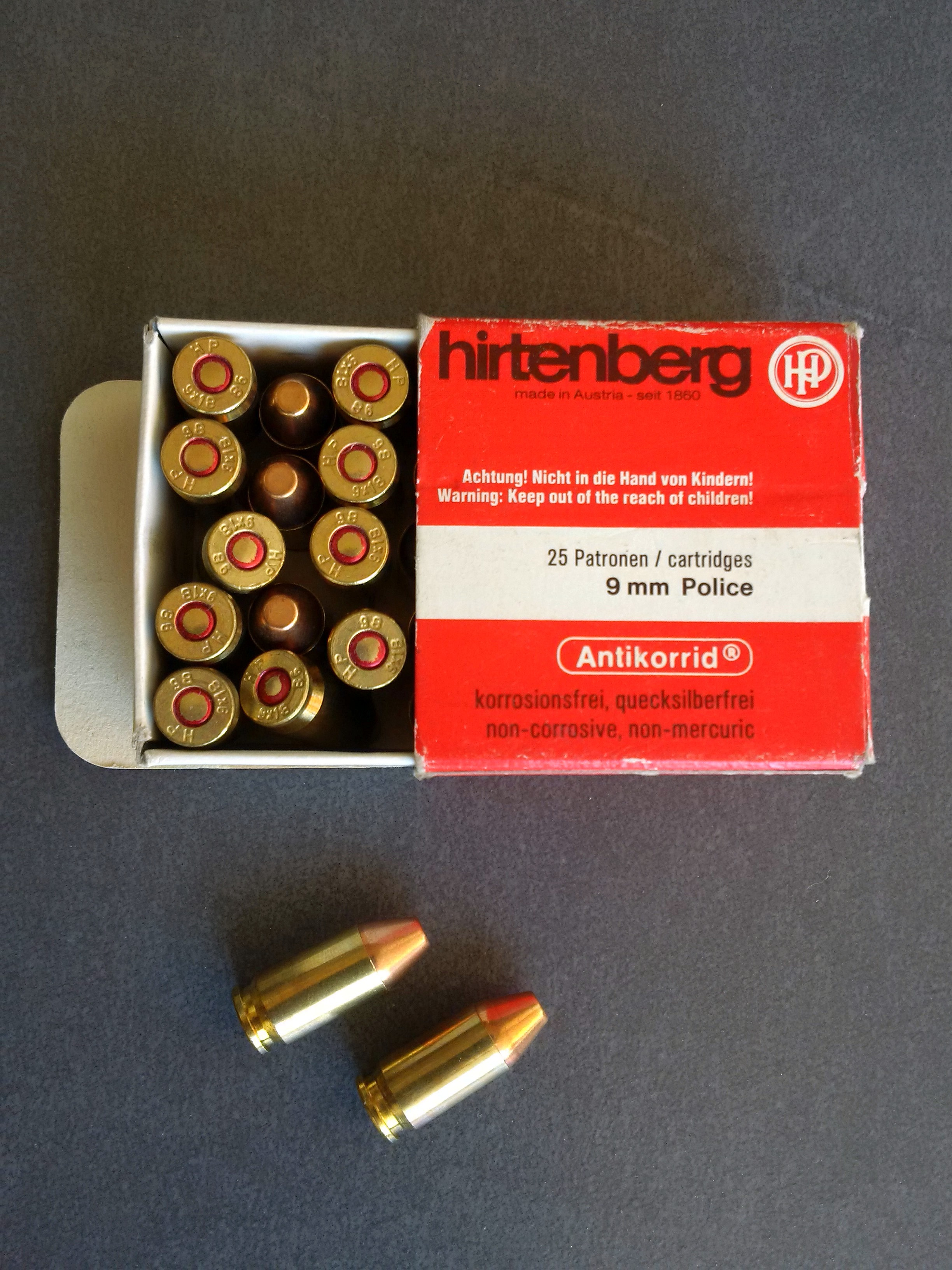 Pistolenmunition Kal. 9 x 18mm